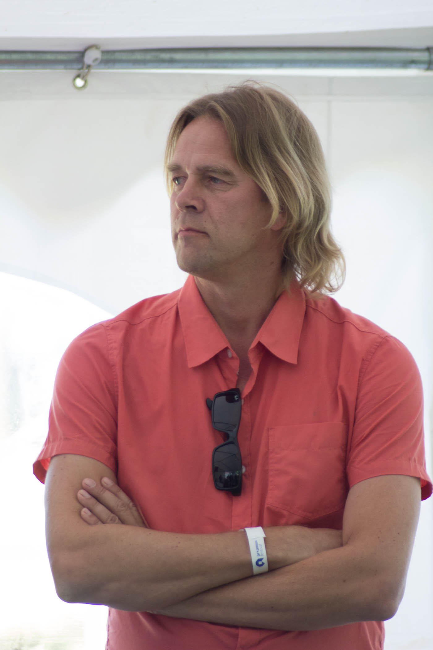 Jussi Jauhiainen arutlemas teemal "Eesti maaelu hääbumine ja elu koondumine linnadesse - kas paratamatu protsess?"